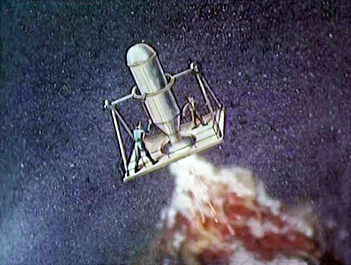 Ricostruzione del velivolo di Kibal'cic